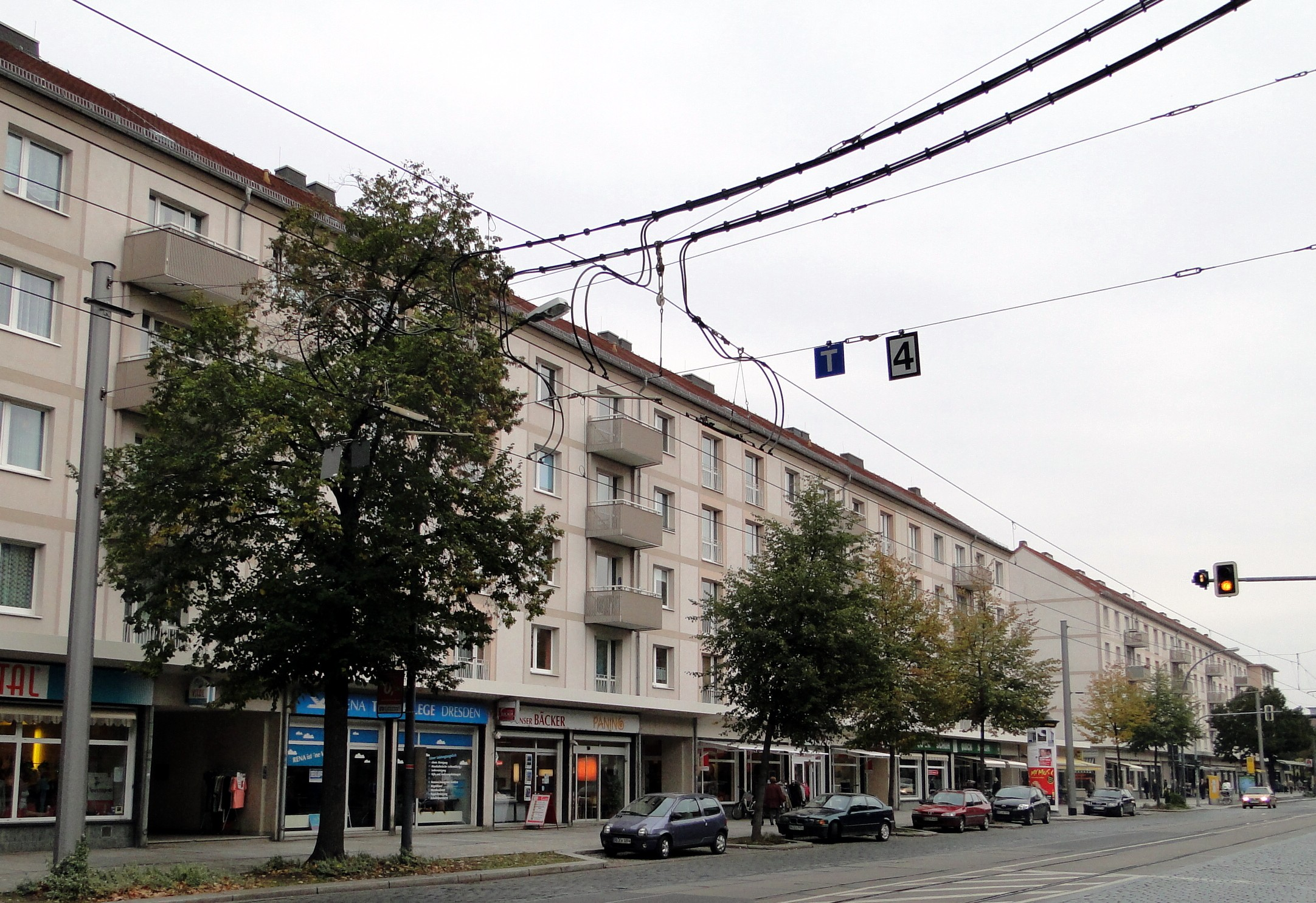 Bebauung der Borsbergstraße aus dem 1950er-Jahren